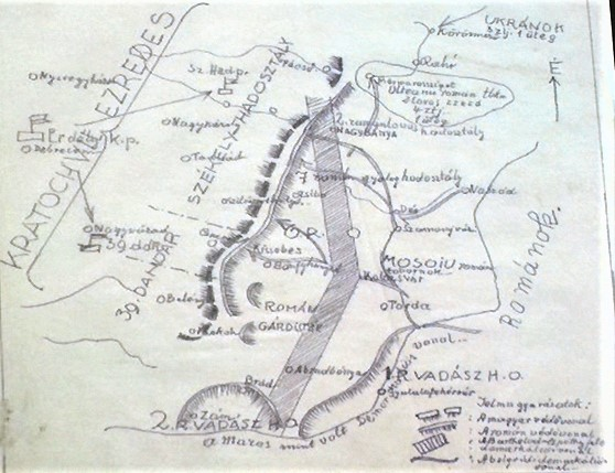 Semleges sáv a Székely Hadosztály és a román hadsereg között - 1919. január. Apáthy István, Kolozsvár polgármestere 1919 január elején megállapodott Henry Berthelot tábornokkal egy 15 km széles semleges sáv létrehozásában a román és a magyar katonai erők között. Kratochvil Károly rekonstrukciója.